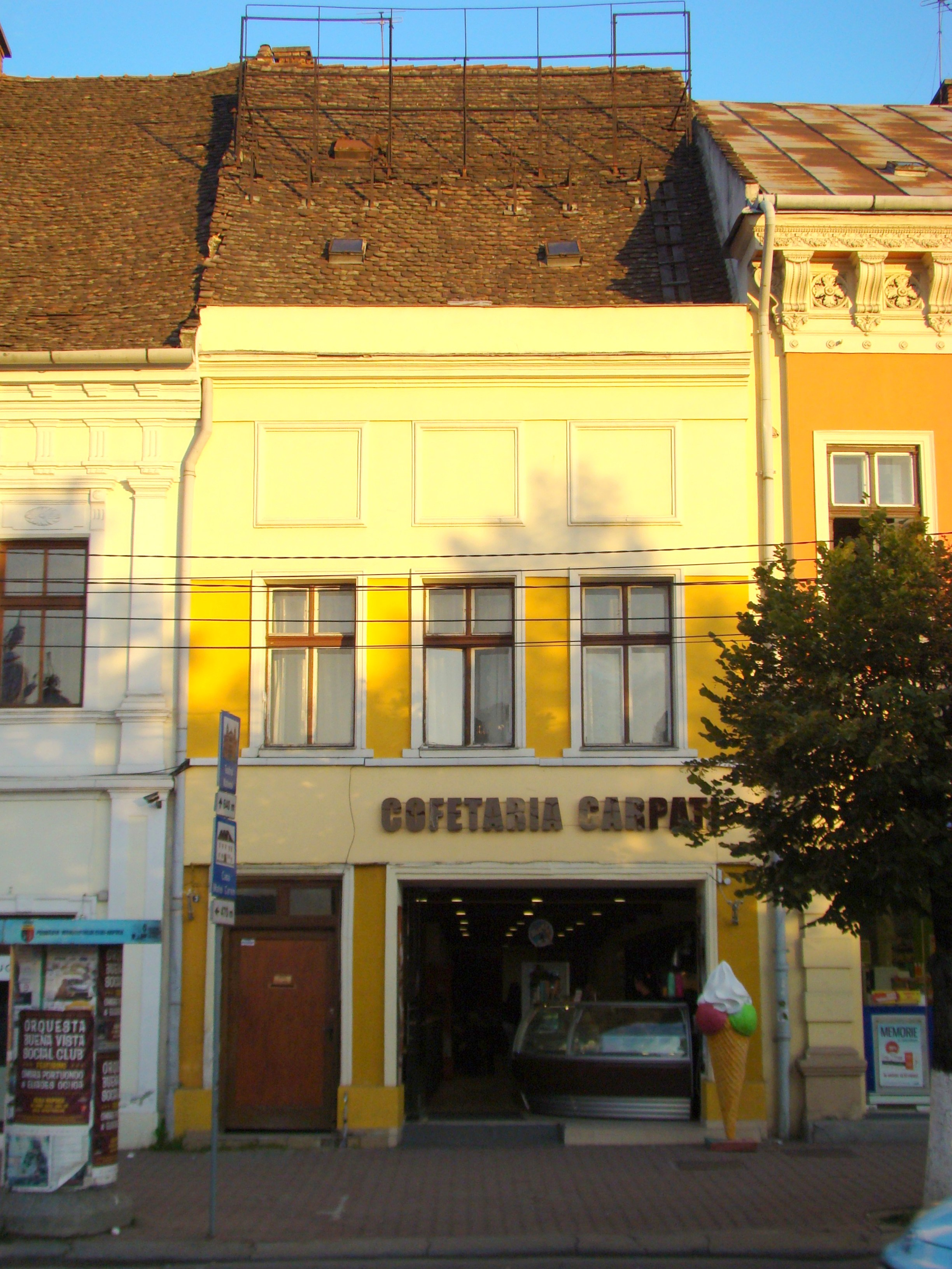 Clădire monument istoric, Piața Unirii, nr.3